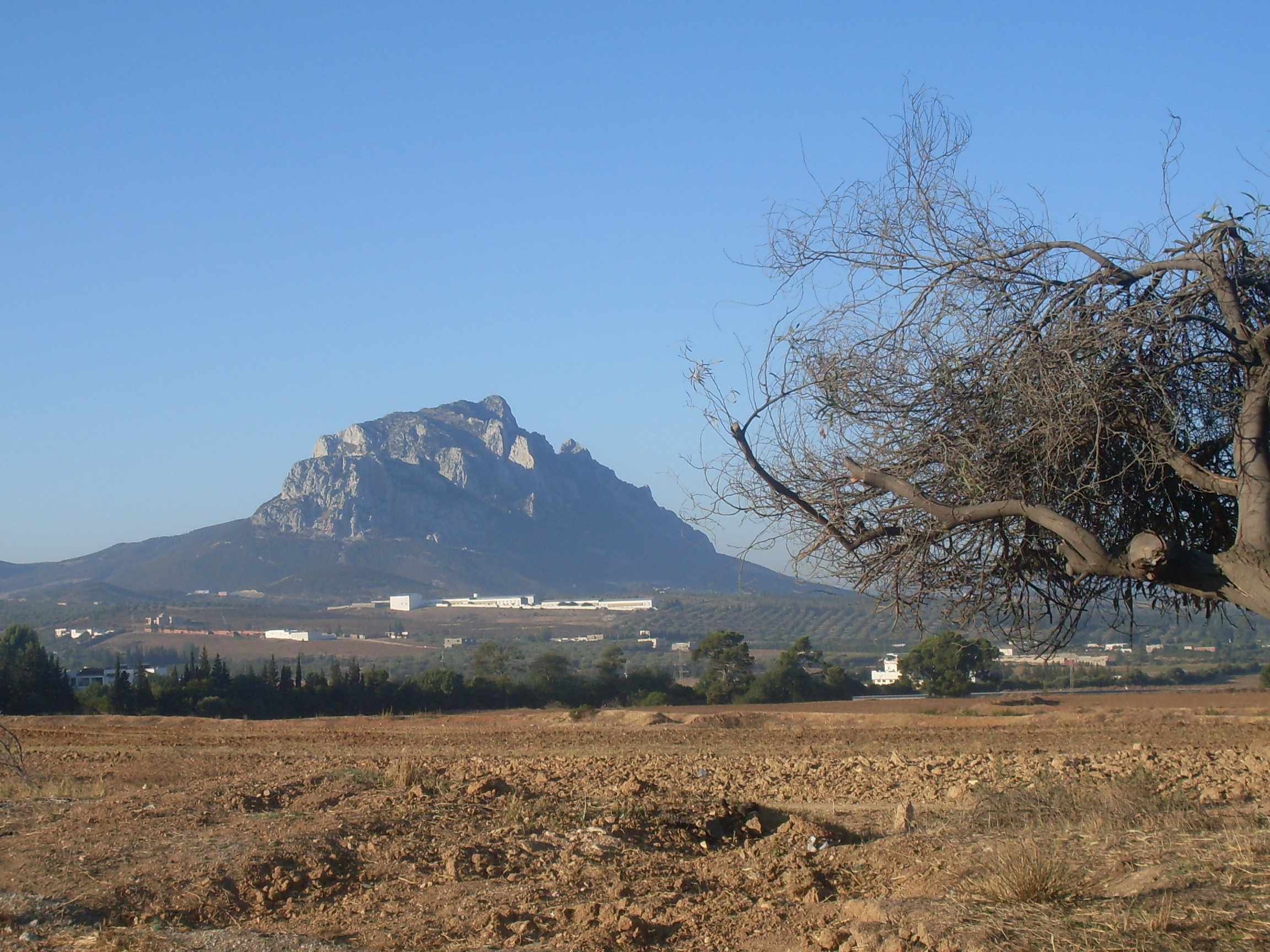 Tunisie, jebel Ressas depuis l'autoroute A1